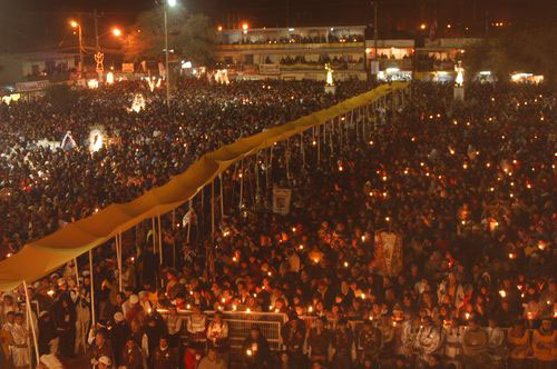 Misa Solemne en la Plaza de La Tirana. 15 de Julio.